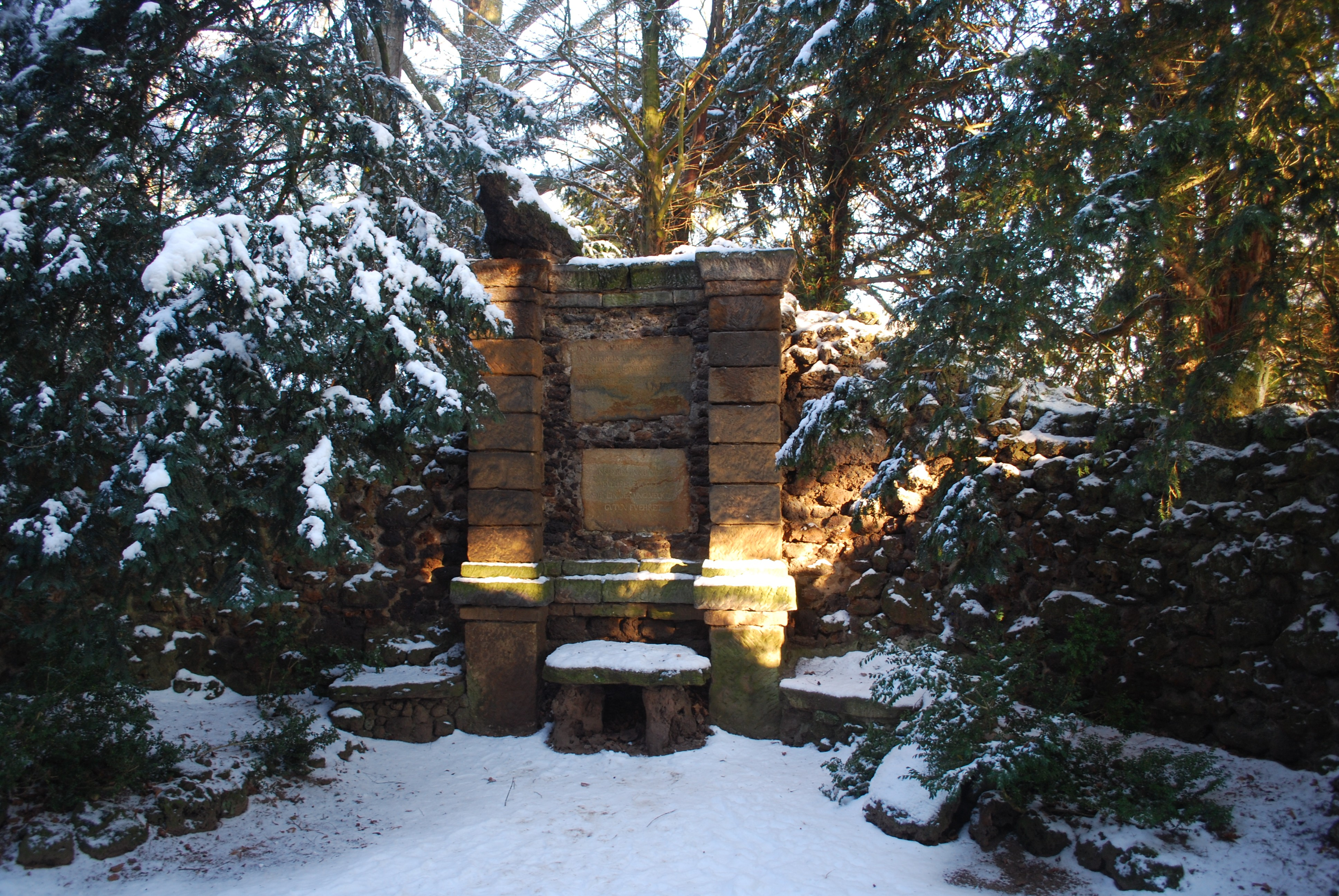 Einsiedelei im Wörlitzer Park im Winter